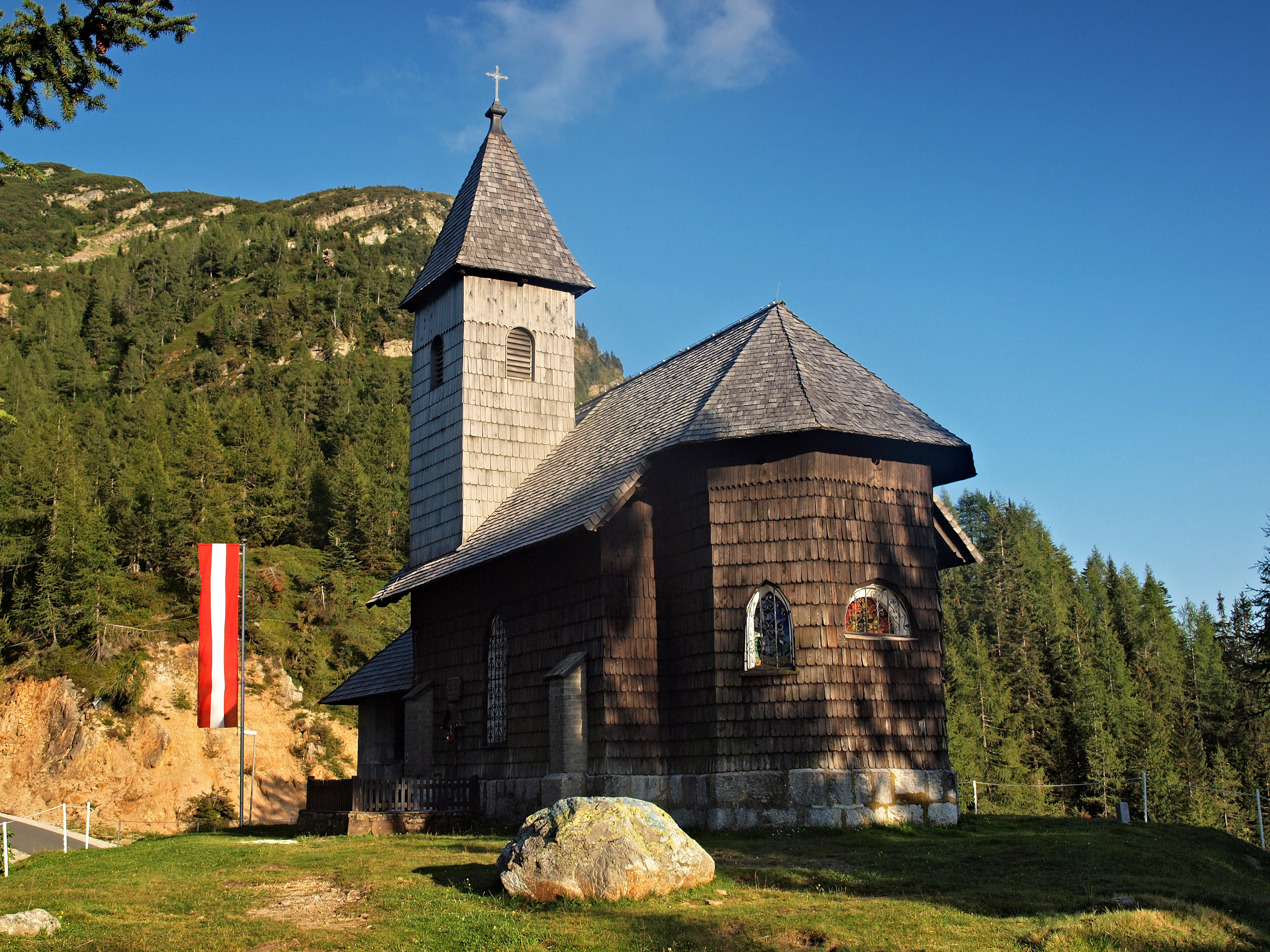 Sonnealpe Nassfeld - Passo Tramollo : chapelle "à cheval" sur la frontière austro-italienne